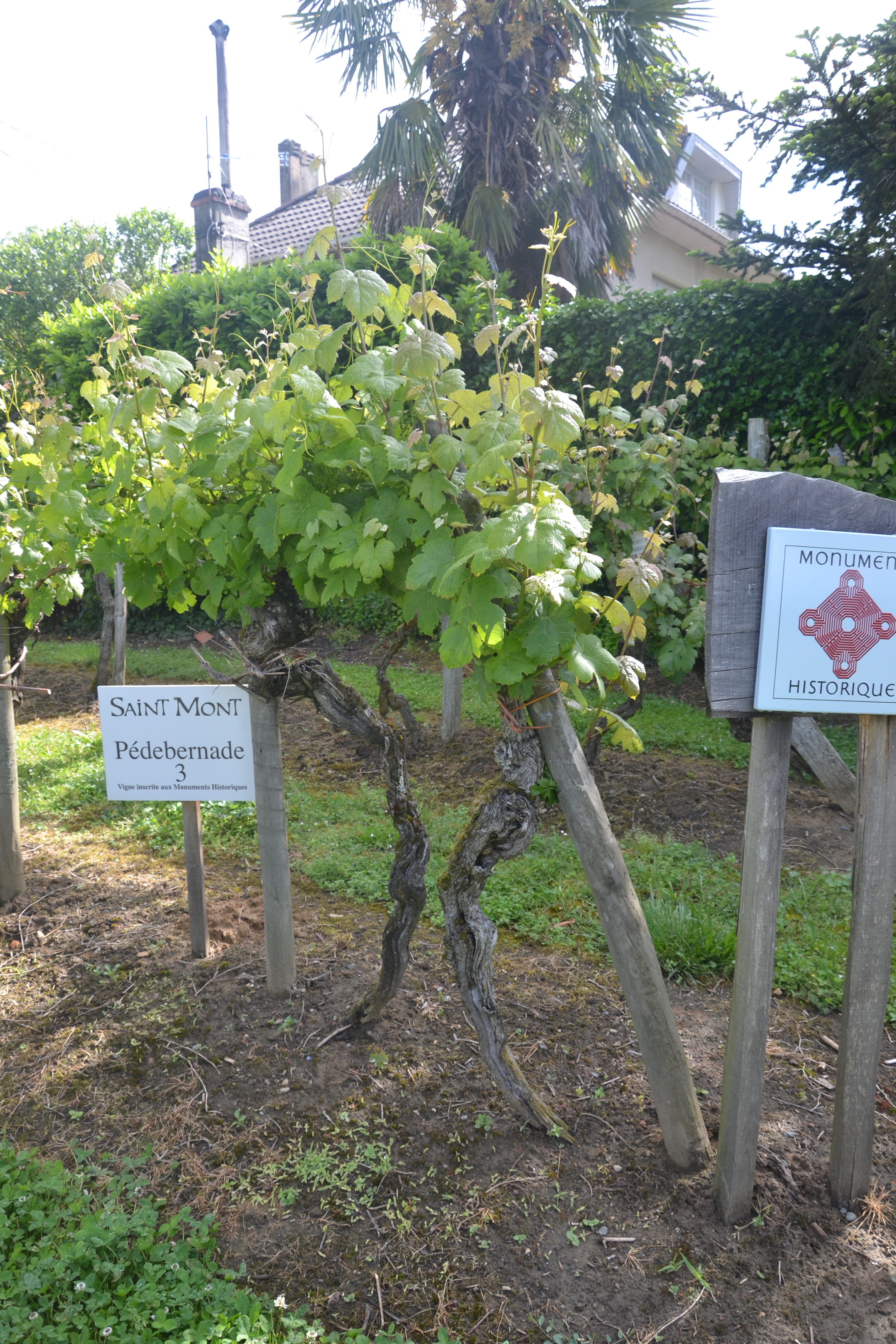 Pieds de Perdebernade 3 à la vigne de la Ferme Pédebernade